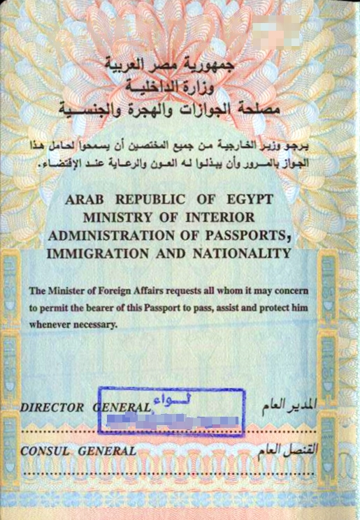 الصفحة الأخيرة بجواز السفر المصري